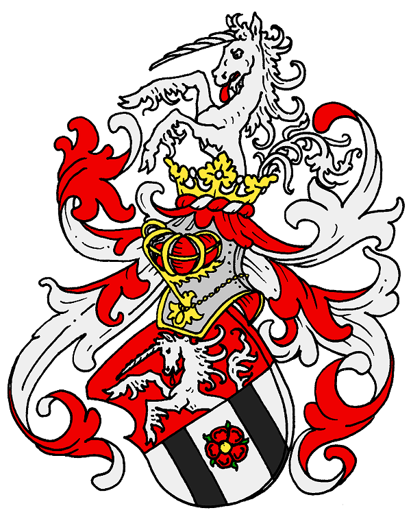 Wappen der von Wegnern (1829)